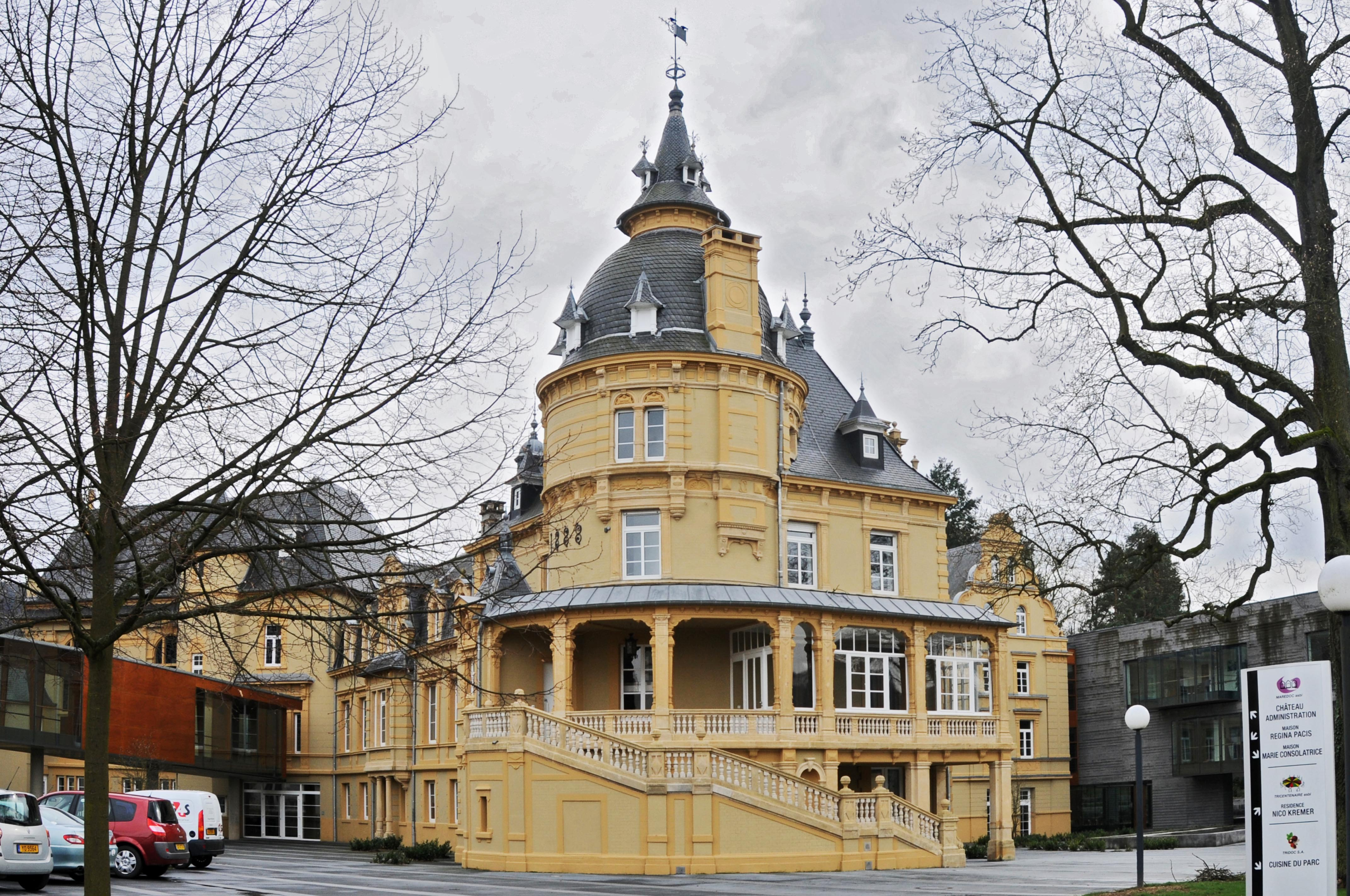 Le château de Heisdorf (Luxembourg)